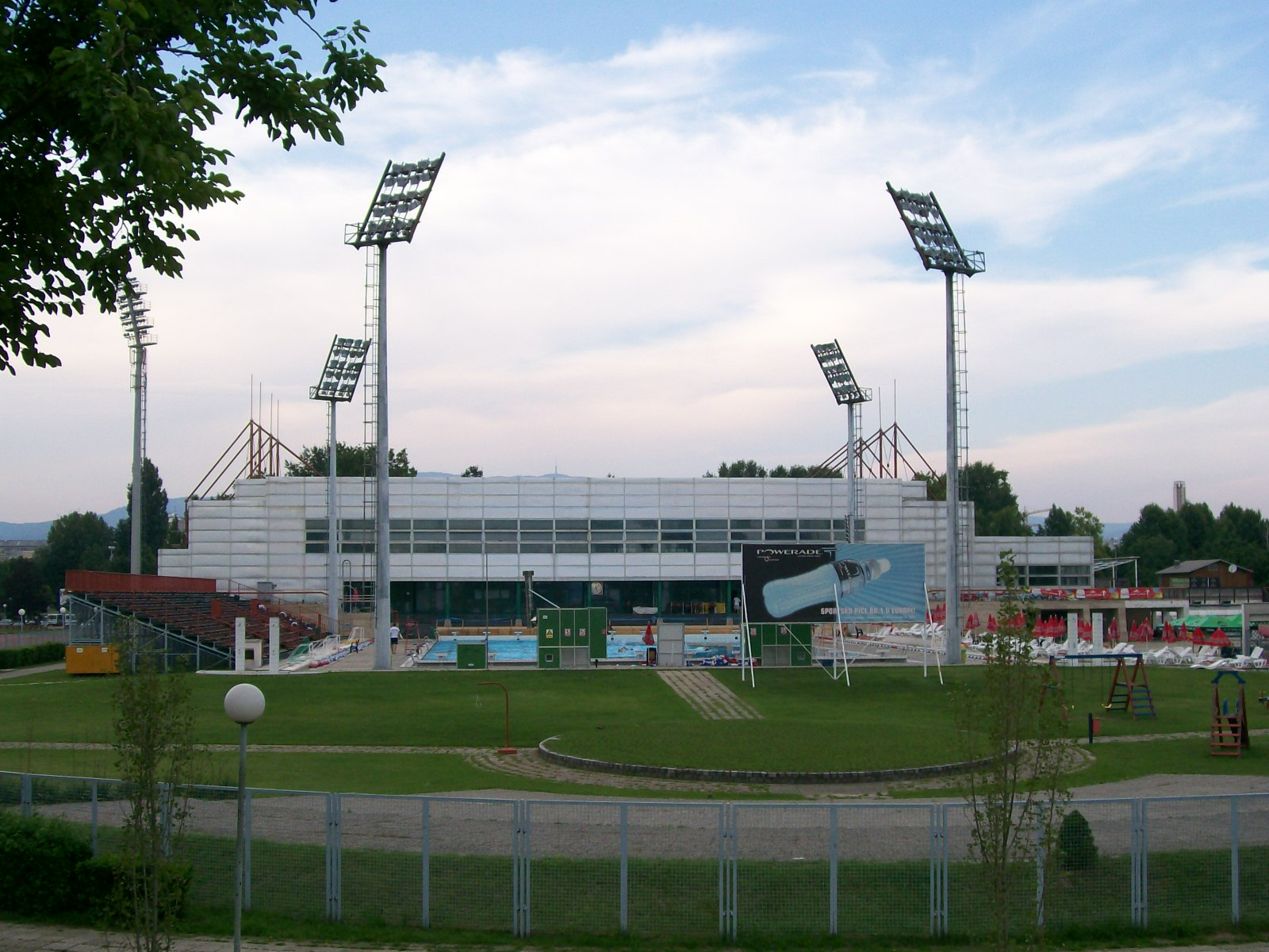 Bazeni Mladost Zagreb